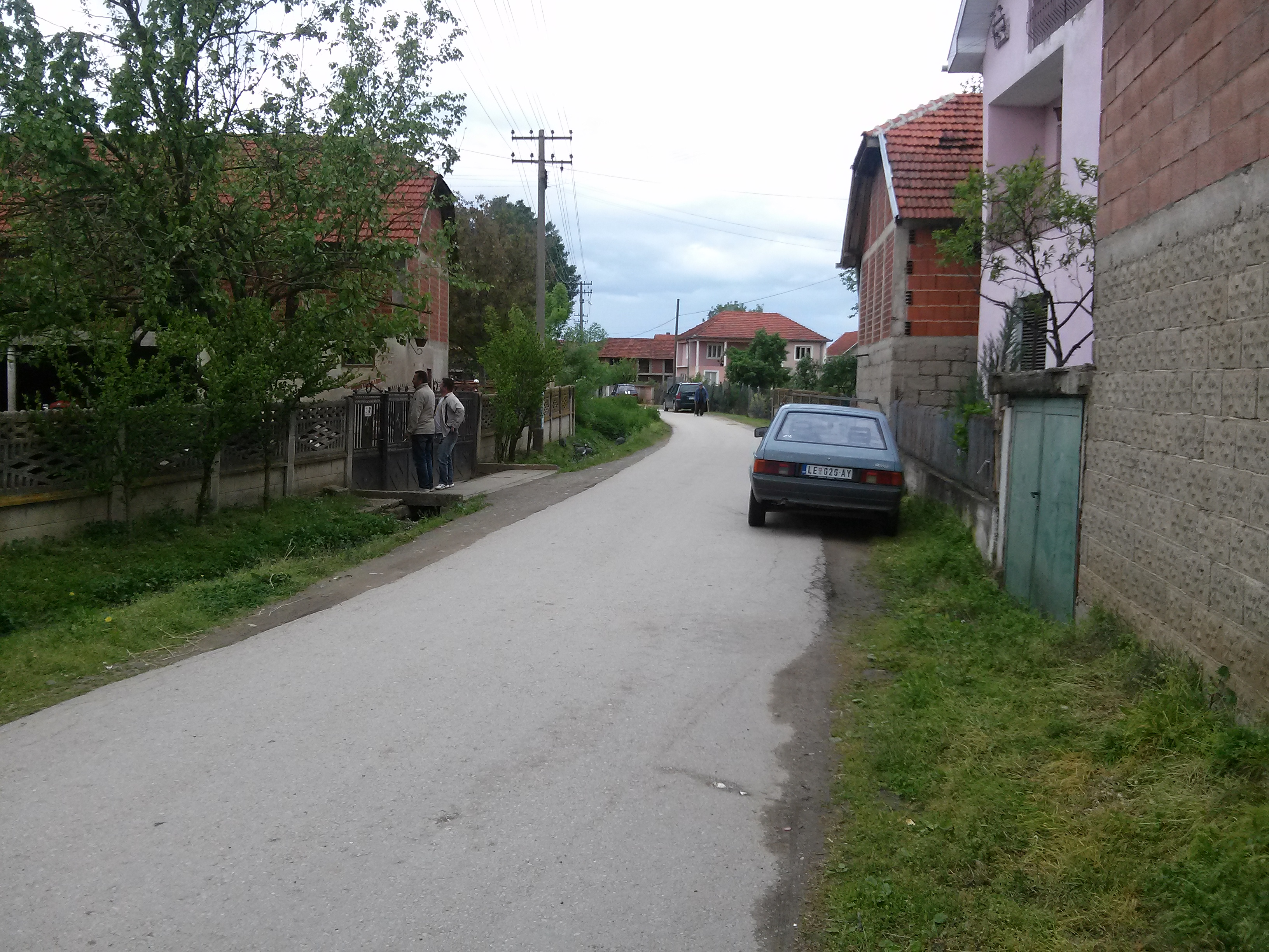 Srpski (latinica): Palikuća, Leskovac